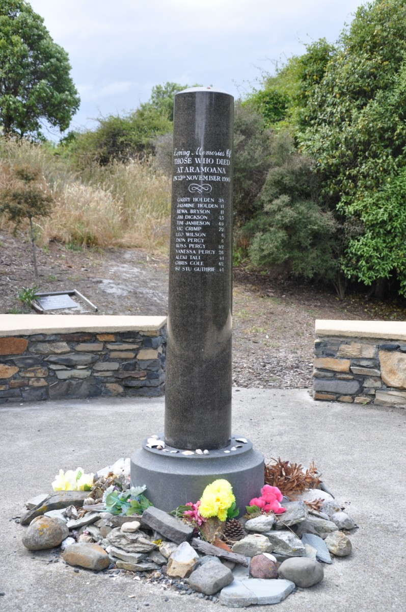 Mémorial de Aramoana